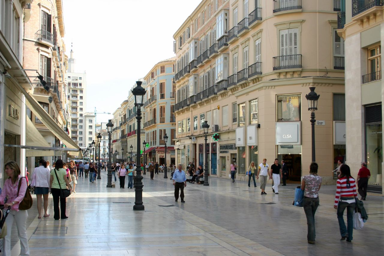 Málaga